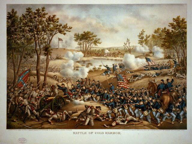 Schlacht von Cold Harbor TITLE: Battle of Cold Harbor CALL NUMBER: PGA - Kurz--Battle of Cold Harbor (D size) [P&P] REPRODUCTION NUMBER: LC-USZC4-1519 (color film copy transparency) LC-USZ62-12912 (b&w film copy neg.) No known restrictions on publication. MEDIUM: 1 print. CREATED/PUBLISHED: c1888 Dec. 24. CREATOR: Kurz & Allison. NOTES: T36667 U.S. Copyright Office. This record contains unverified data from PGA shelflist card. Associated name on shelflist card: Kurz & Allison. REPOSITORY: Library of Congress Prints and Photographs Division Washington, D.C. 20540 USA DIGITAL ID: (color film copy transparency) cph 3b53023 (b&w film copy neg.) cph 3a15251 CARD #: 2003656852